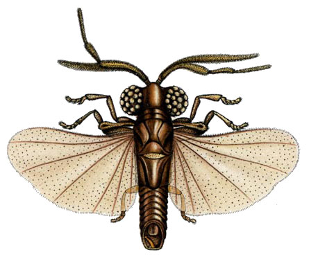 Male Myrmecolax nietneri, Myrmecolacidae, Strepsiptera